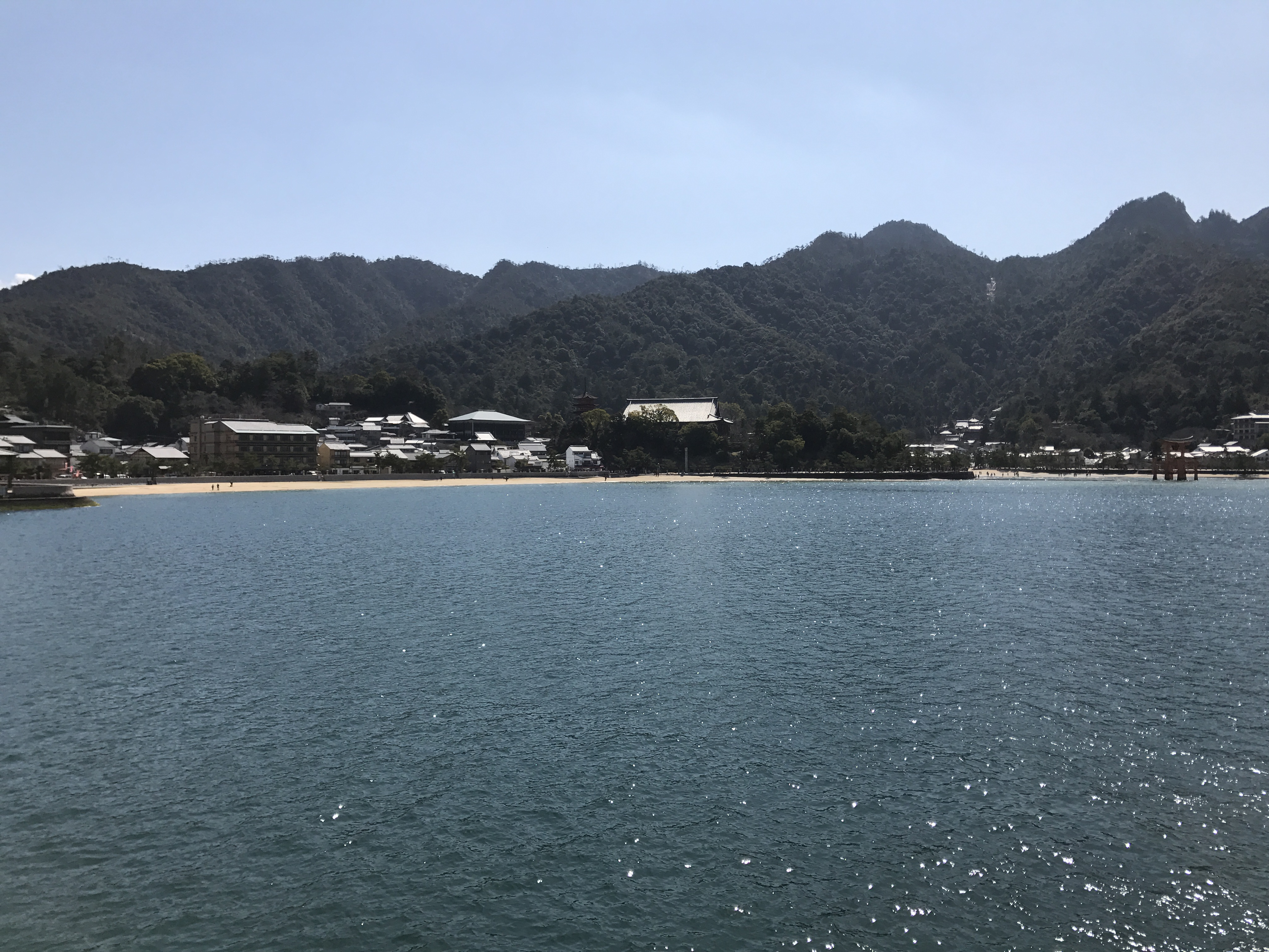 JR西日本宮島フェリーより望む厳島